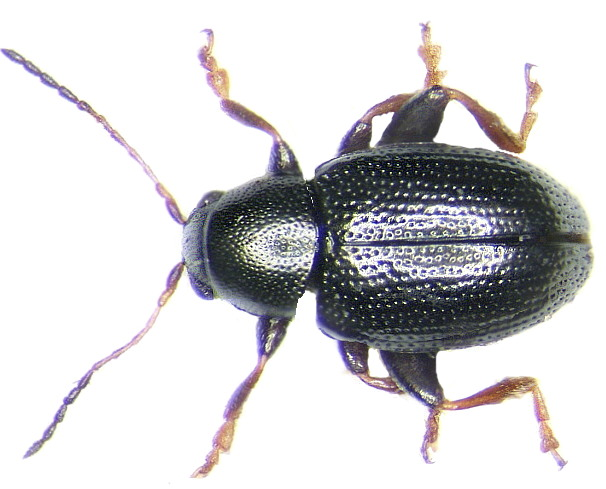 Chaetocnema aridula (Gyllenhal, 1827) Familie: Chrysomelidae Grösse: 2-2,6 mm Verbreitung: Europa Ökologie: an Gramineen Fundort: Germania, Oberfranken, Selbitz leg.det. U.Schmidt, 2003 Foto: U.Schmidt, 2005